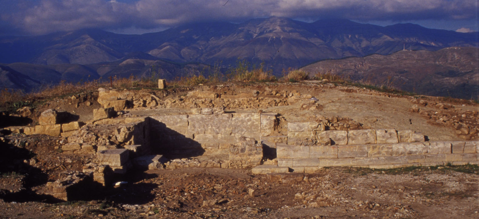 il thesauròs di Phoinike (Albania)